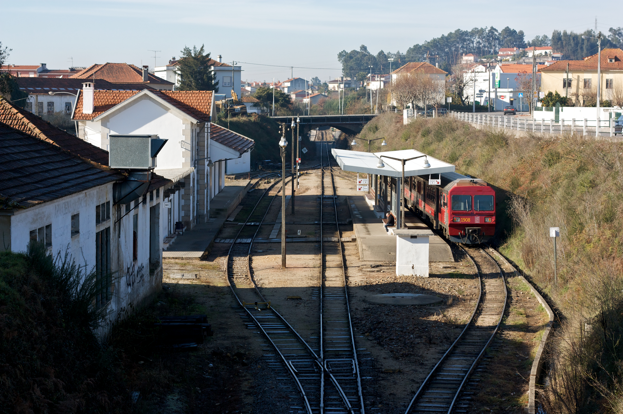 Tipo: E Estação Local: Águeda Linha do Vouga, PK 14 Data e hora: 25 de Dezembro de 2008 11h12 à direita: Tipo: Comboio Regional 5110 Águeda - Aveiro Material: Automotora 963x Unidade Dupla Diesel - Via Estreita